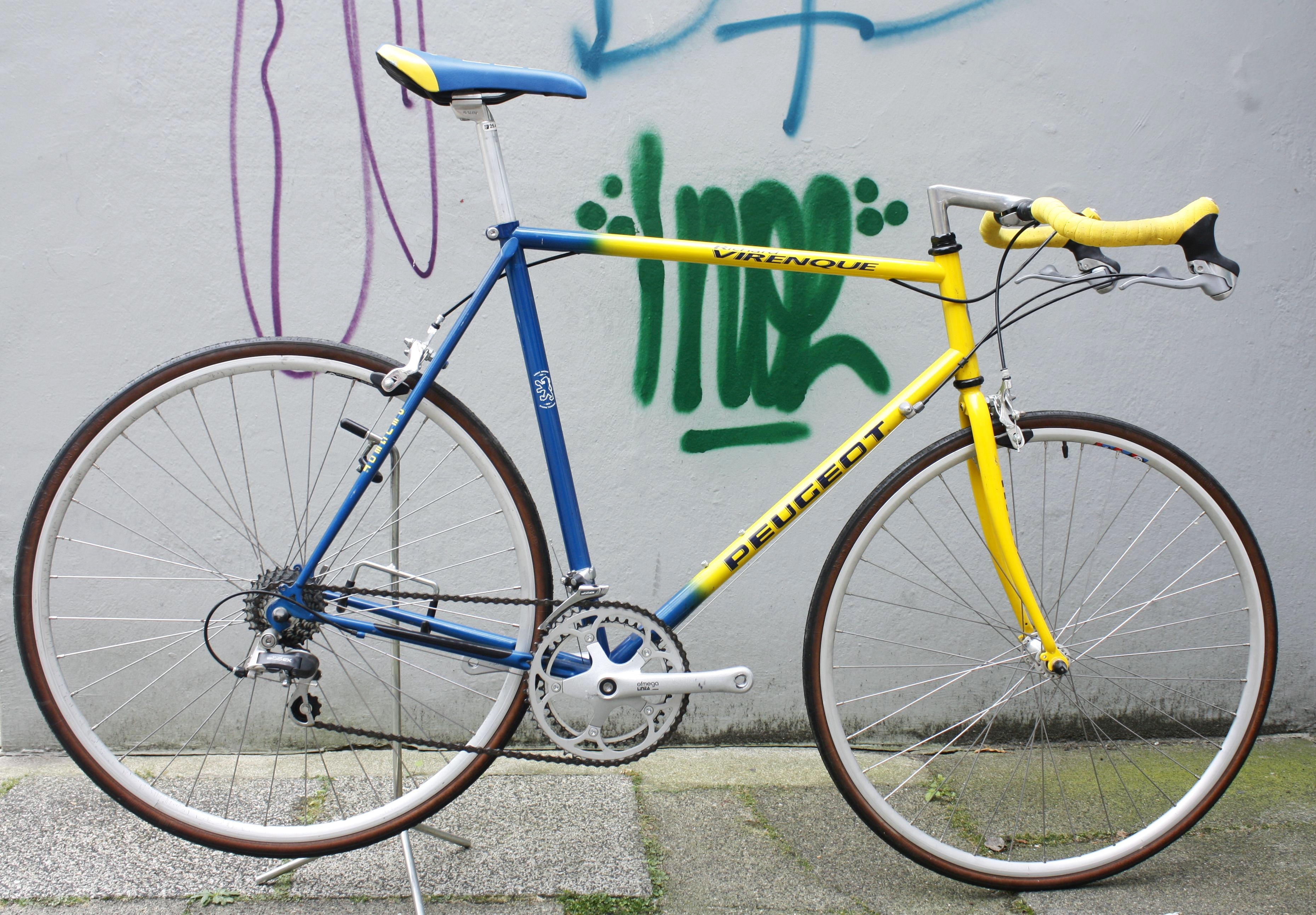 Peugeot Road Bike (ca 1995)